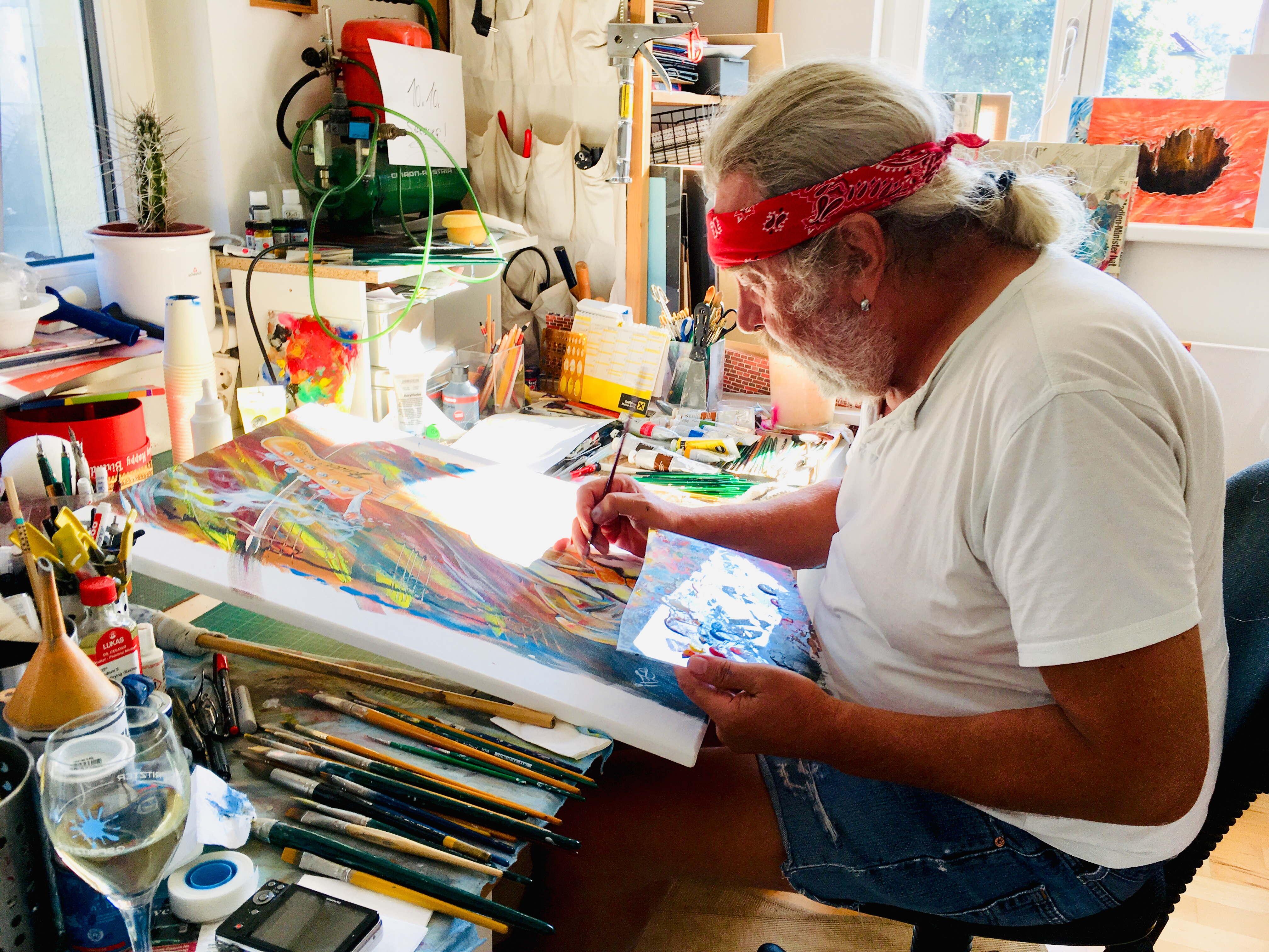 Itze Grünzweig beim Malen in seinem Atelier in Klosterneuburg 2018